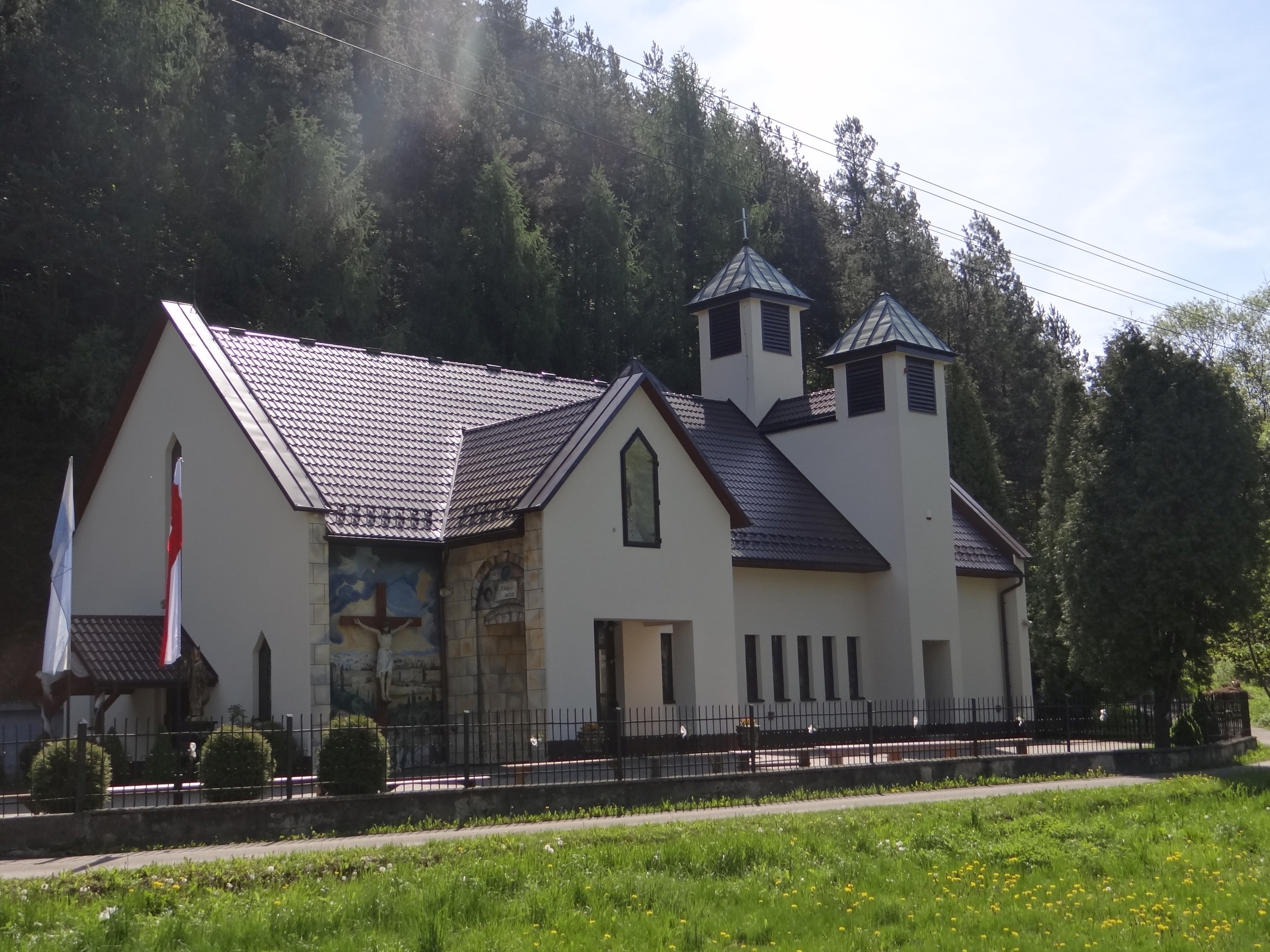 Kościół w Szklarach